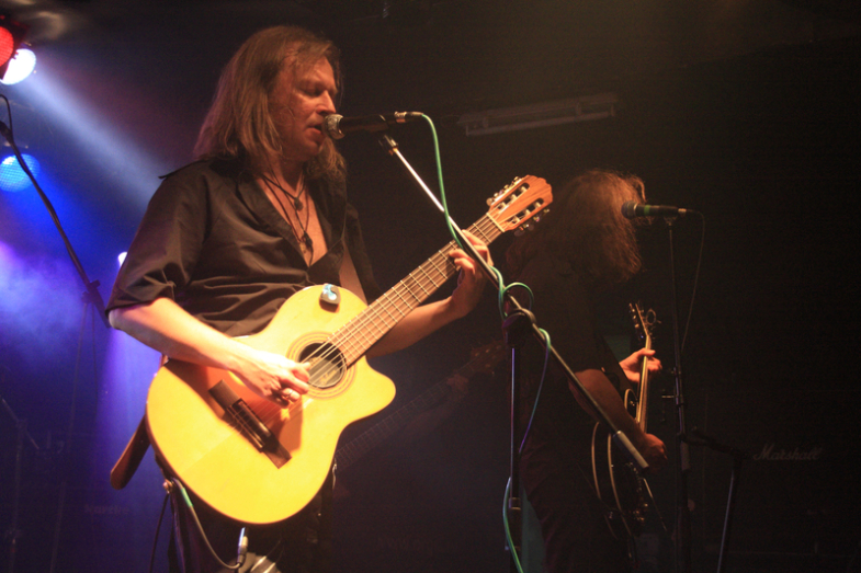 Сергей Калугин